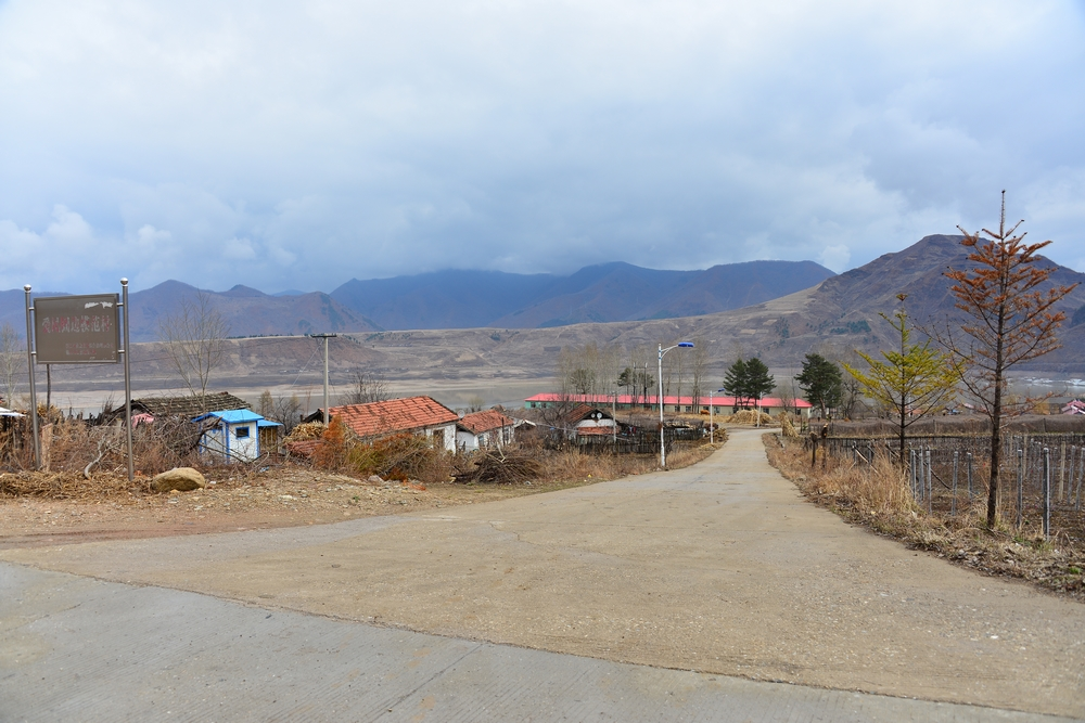 巡道工出品 photo by Xundaogong——白马浪村